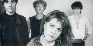 sveska